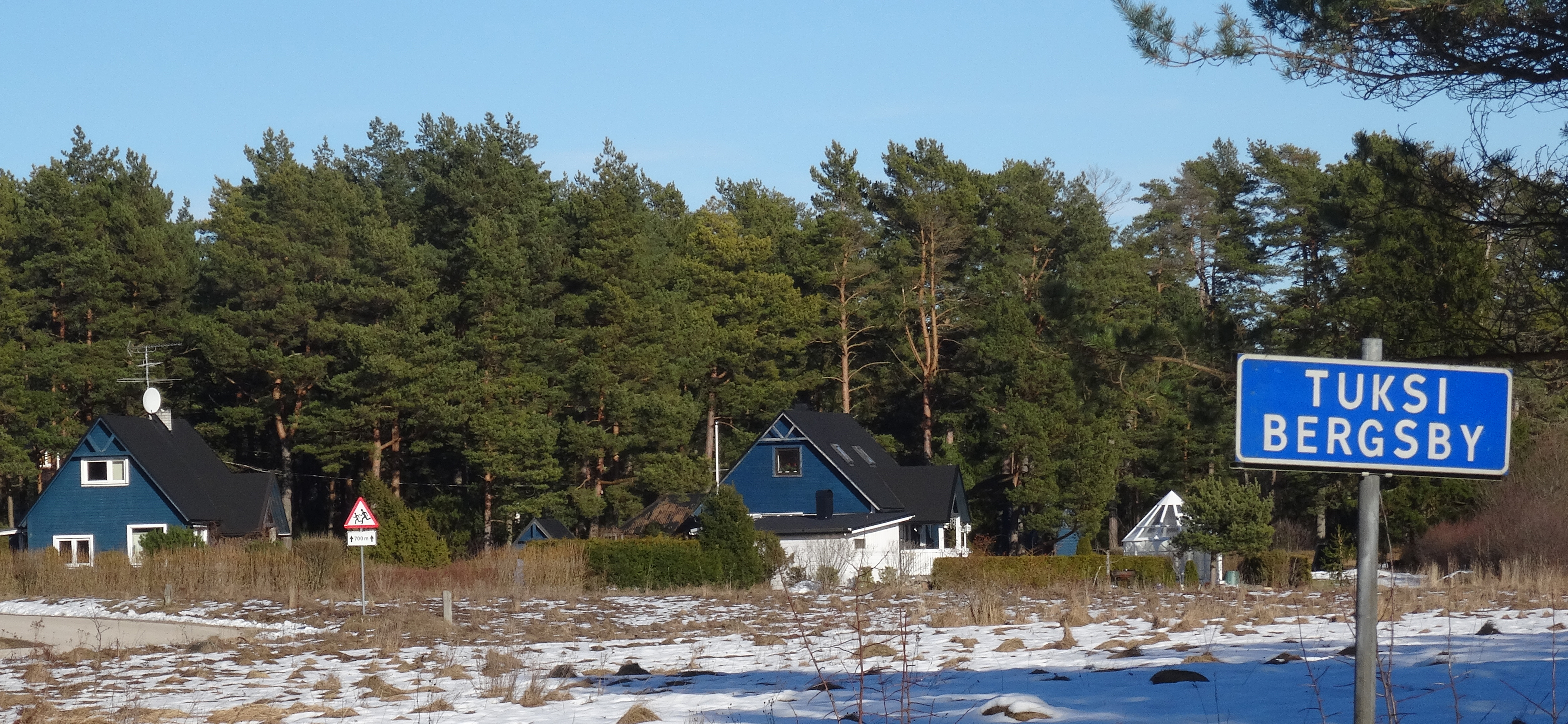 Dorfeinfahrt der estnischen Ortschaft Tuksi im Landrkeis Lääne.